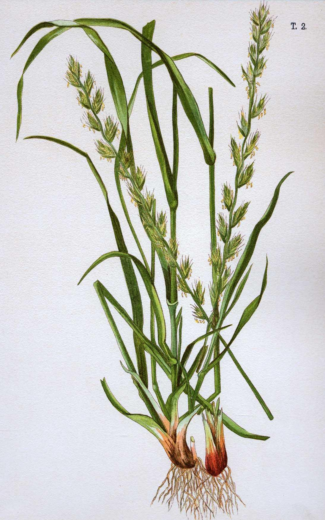 Райграсс итальянский (Lolium italicum)